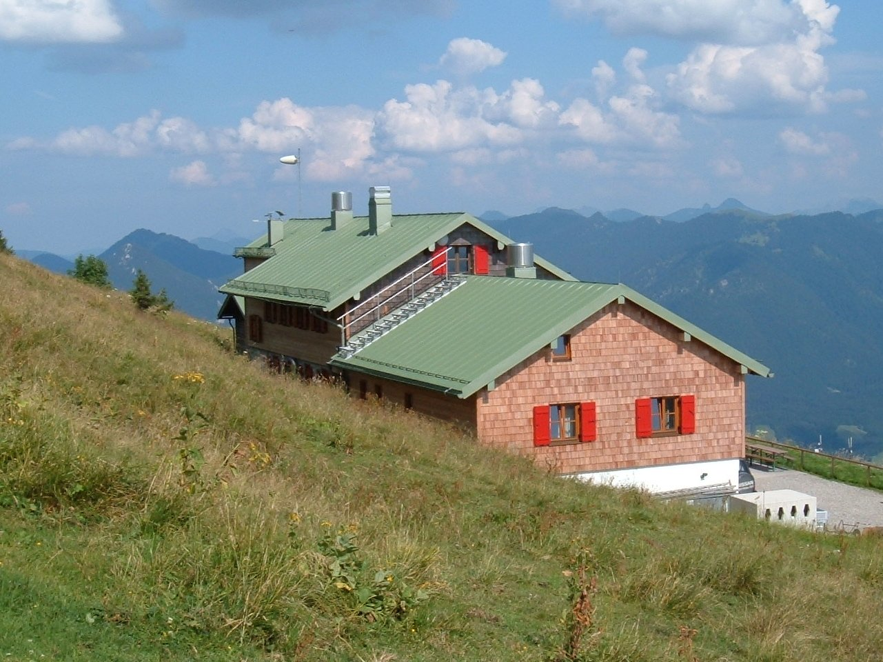 Brauneck-Gipfelhaus